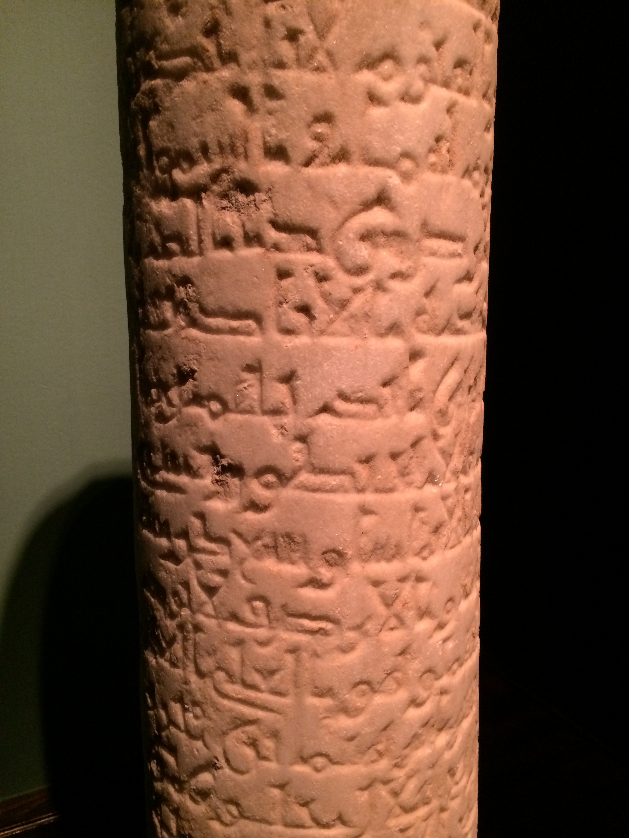 Kufic Arabic writing from AlQayrawan Tunisia engraved on marble from the 9th century AC خط عربي كوفي منحوت على رخام تعود لمدينة القيروان في تونس القرن التاسع الميلادي